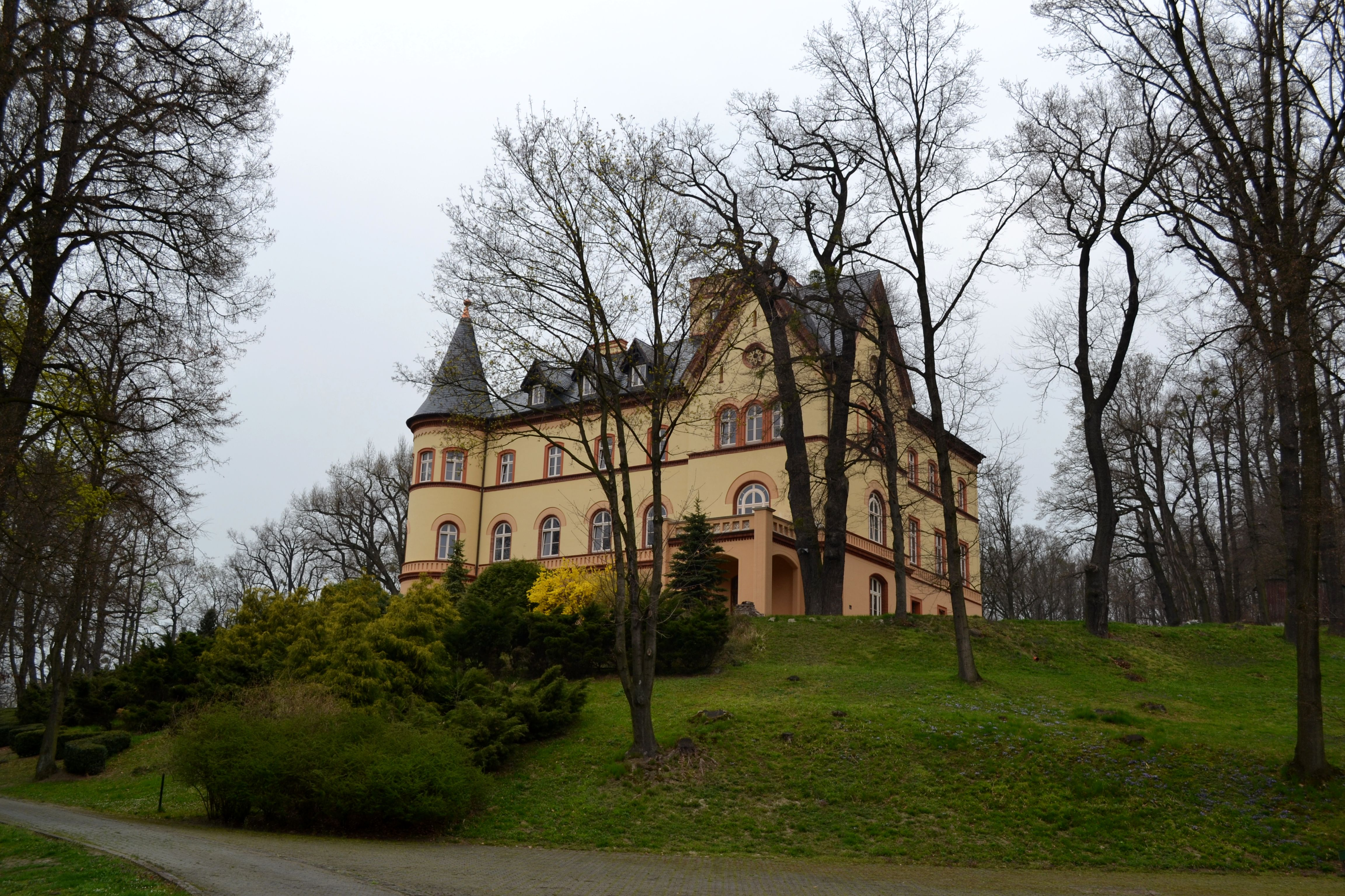 Jastrzębie, zespół pałacowy, XVIII w., XIX w.